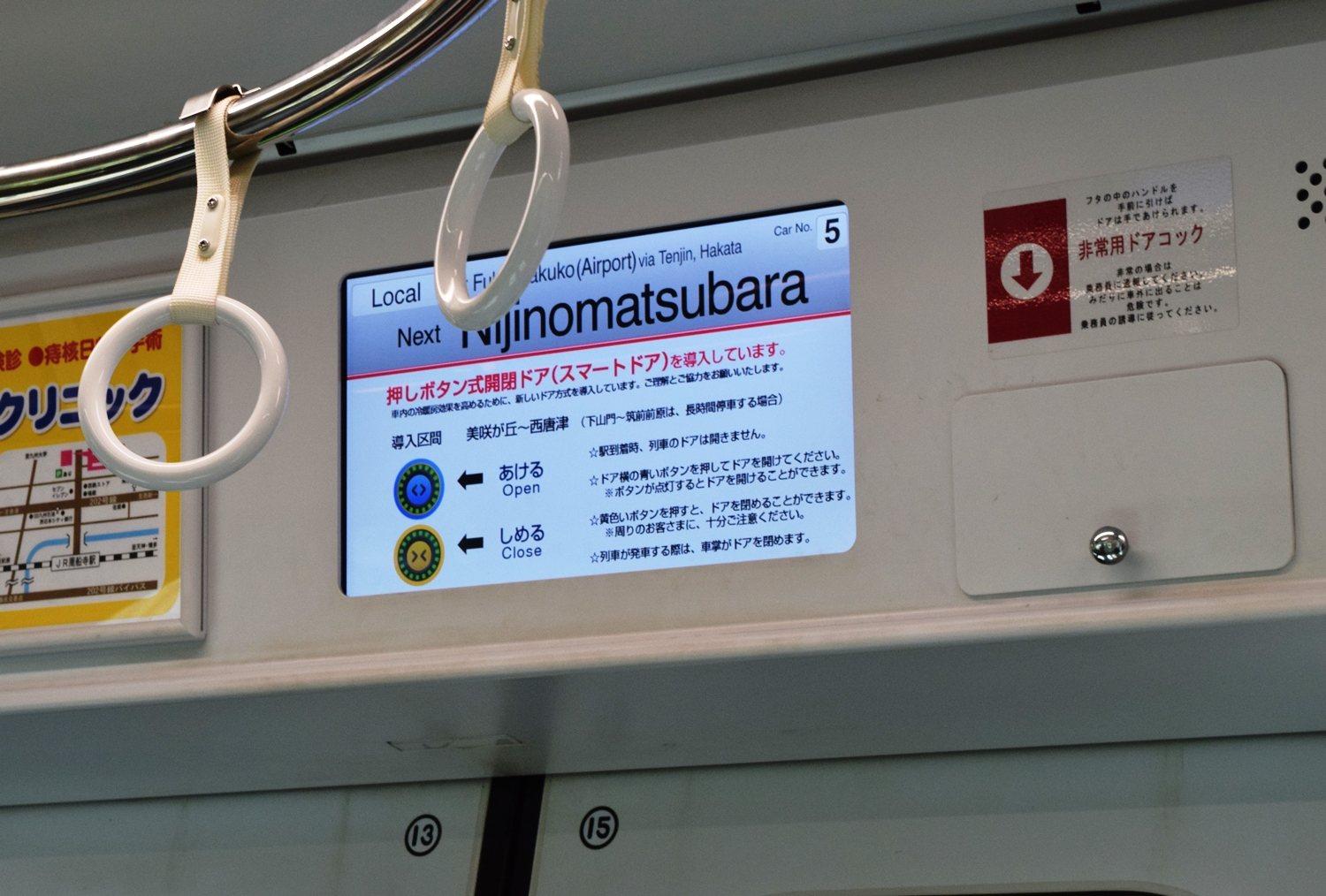 1画面時代